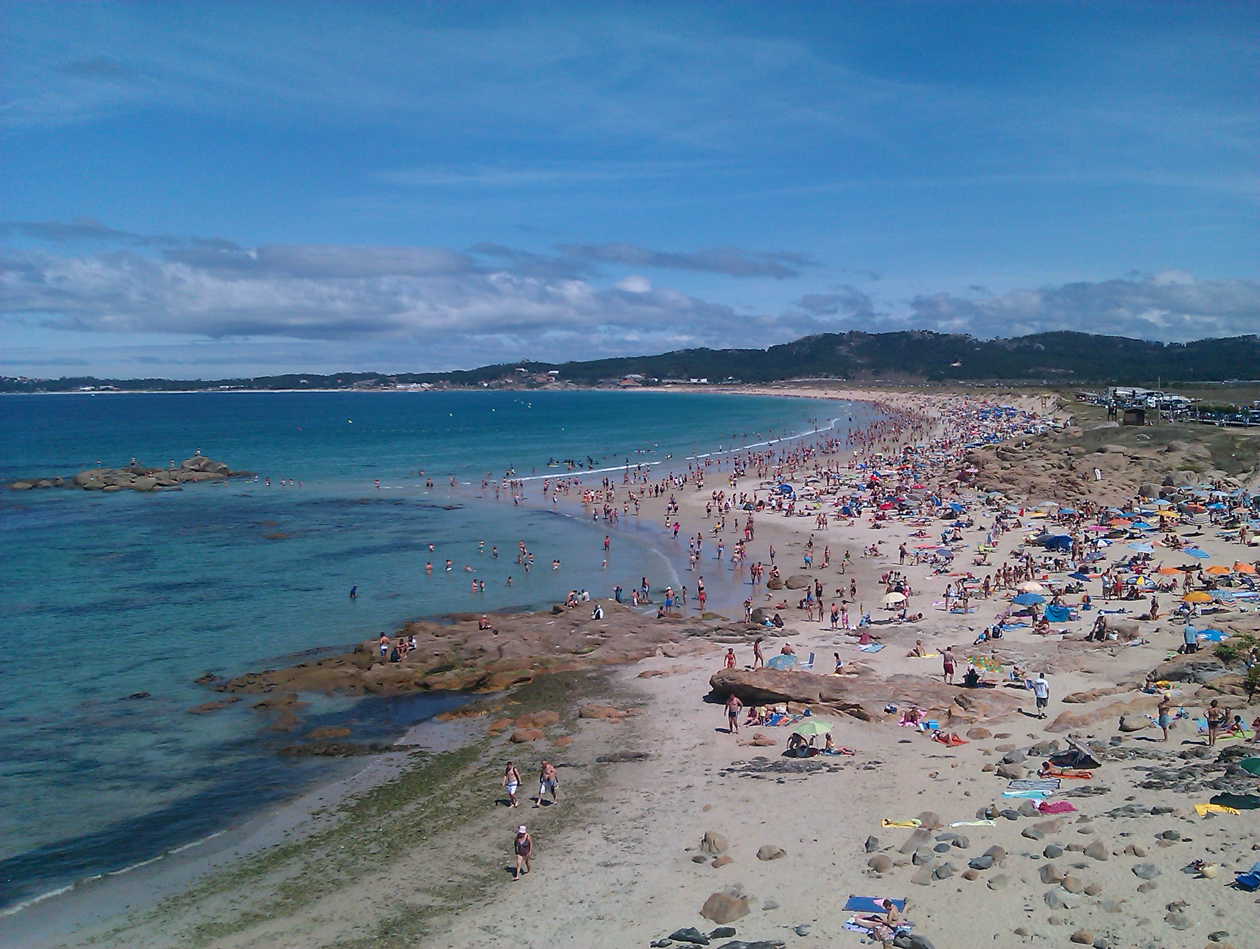 Playa de A Lanzada